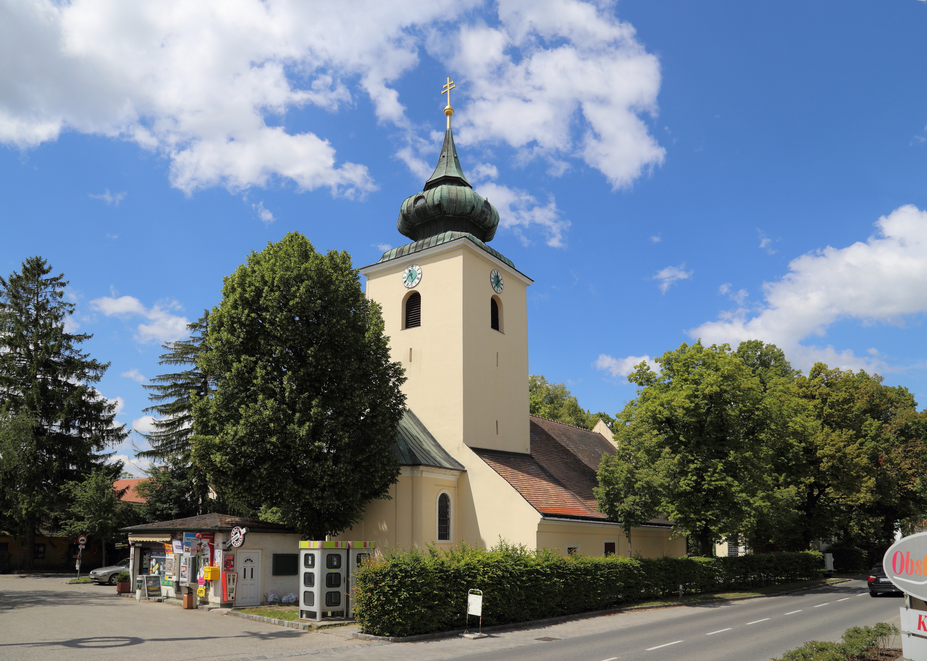 Nordostansicht der Pfarrkirche hl. Magdalena in der niederösterreichischen Gemeinde Raasdorf. Ein schlichter Sakralbau in der Mitte des Angers. Der gedrungene Ostturm (mit einer Biedermeierhaube) wurde in der 2. Hälfte des 13. Jahrhunderts über einem romanischen Chorquadrat errichtet, das Langhaus und der Chor mit rundem Schluß im Jahr 1736.